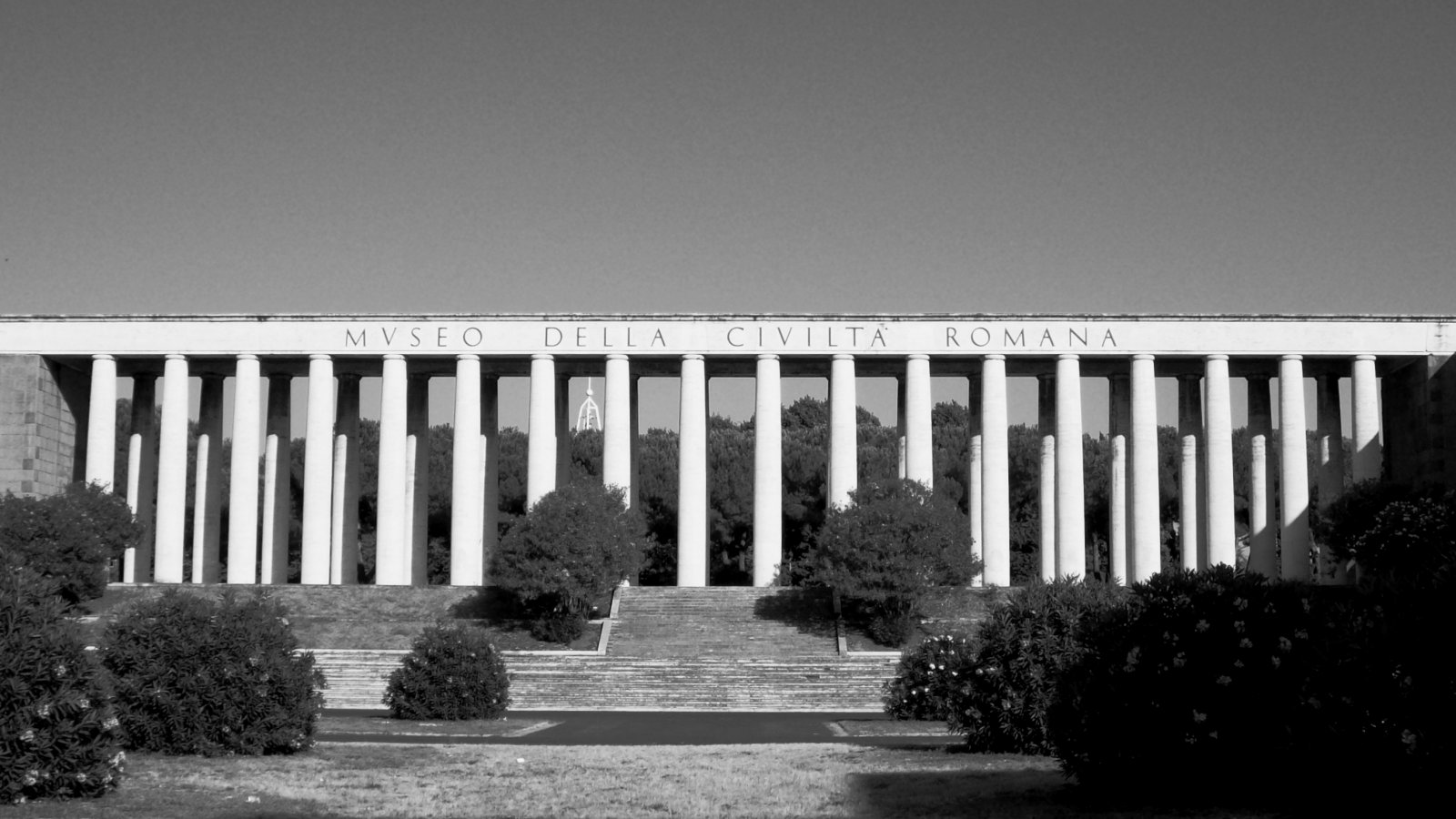 Il colonnato di fondo del museo della Civiltà Romana a Roma EUR, rielaborazione in bianco e nero